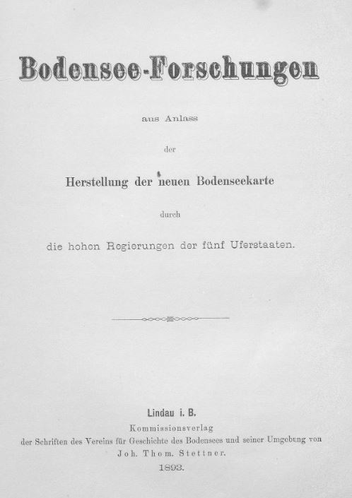 Titelblatt des ersten Teils der Bodensee-Forschungen, erschienen 1893 als Beiheft zu Band 22 der Schriften des Vereins für Geschichte des Bodensees und seiner Umgebung